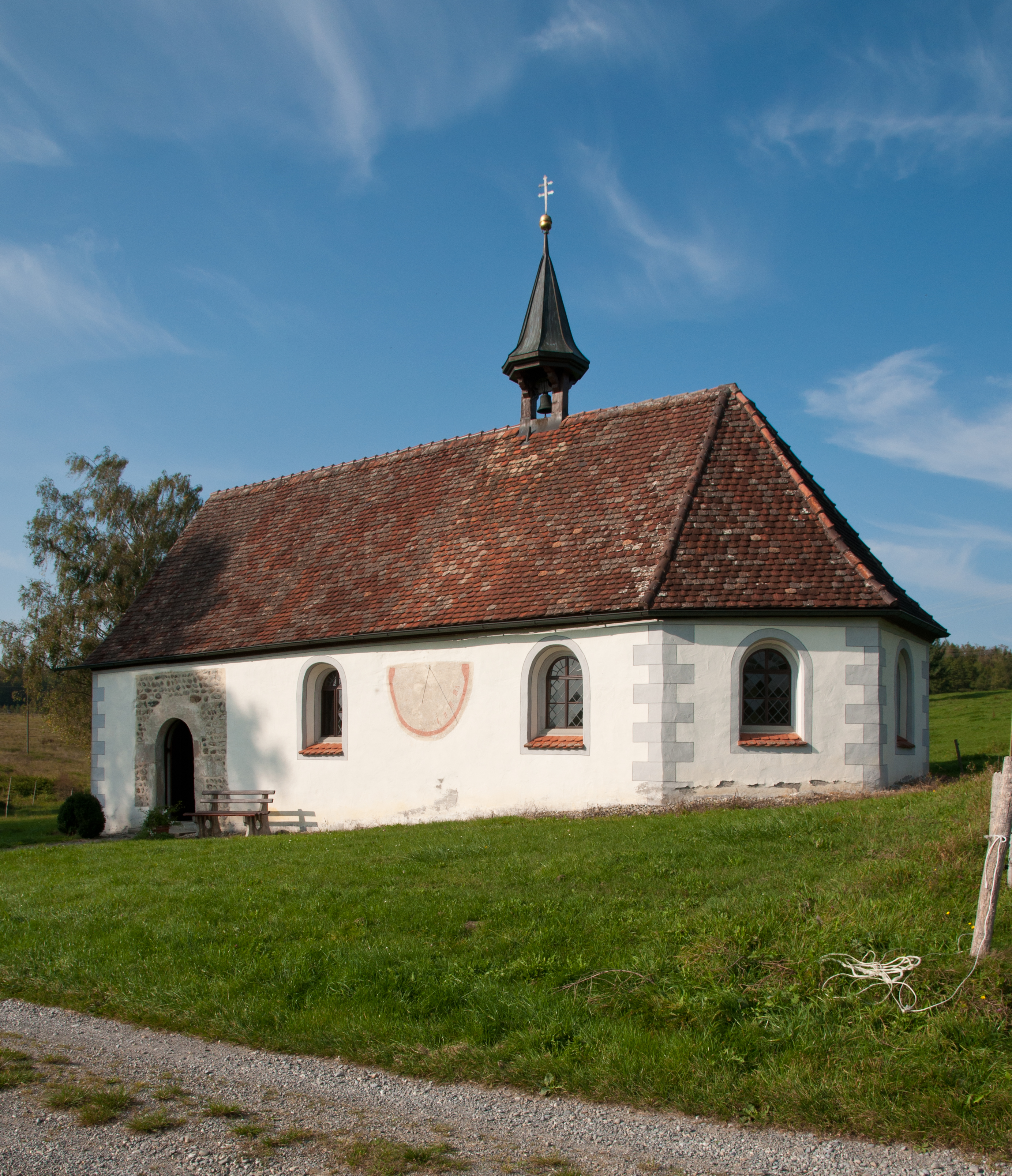 Dreifaltigkeitskirche Braitenbach, zwischen Stetten und Markdorf. Die Dreifaltigkeitskapelle war und ist eine Anlaufstelle der Jakobspilger. Im Inneren finden sich alte, mit Rötelstift aufgetragene Grafitti